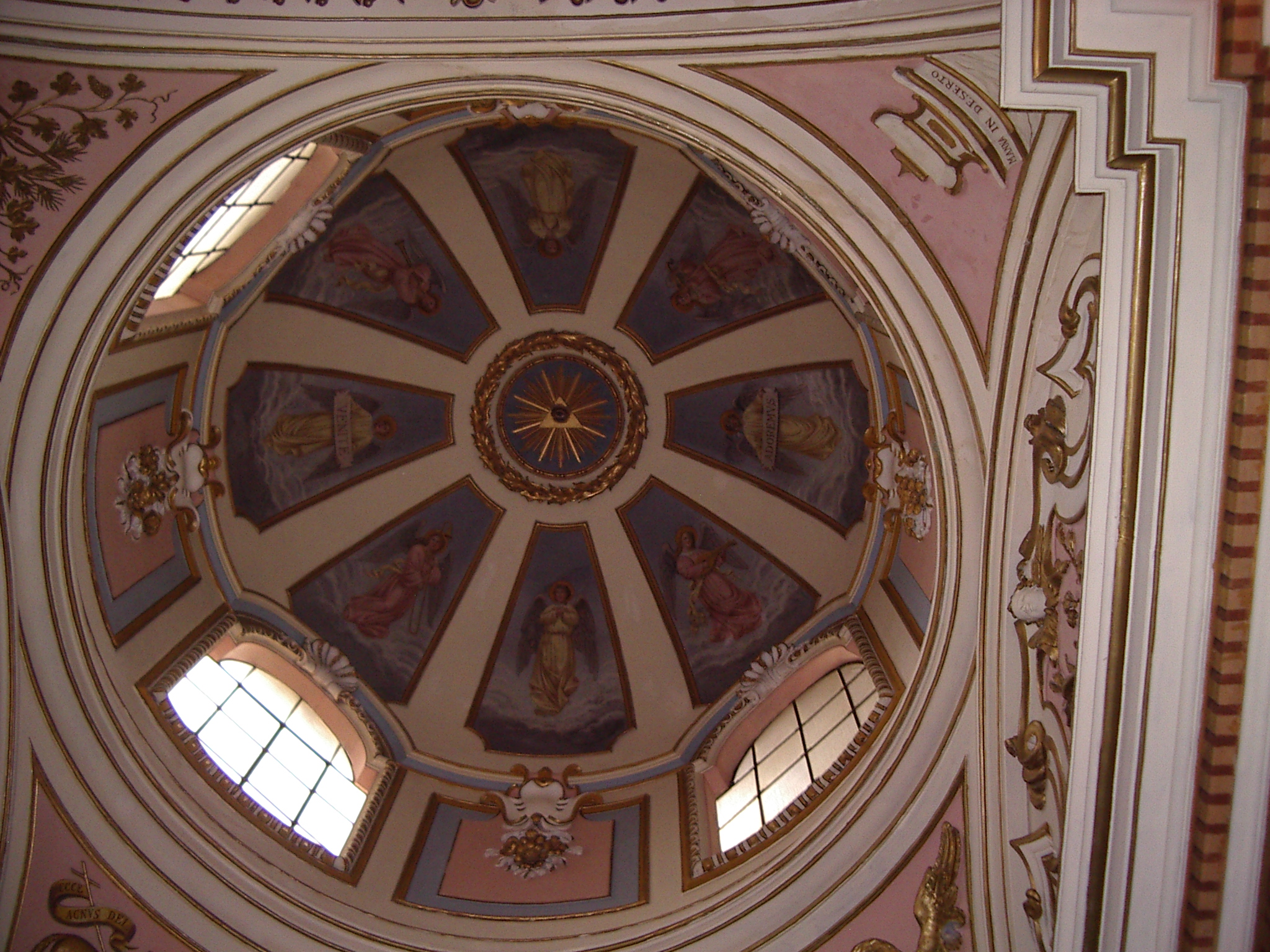 Interieur de la coupole de la chapelle du Santissimo Sacramento, Cathédrtale de Cagli, Marches.